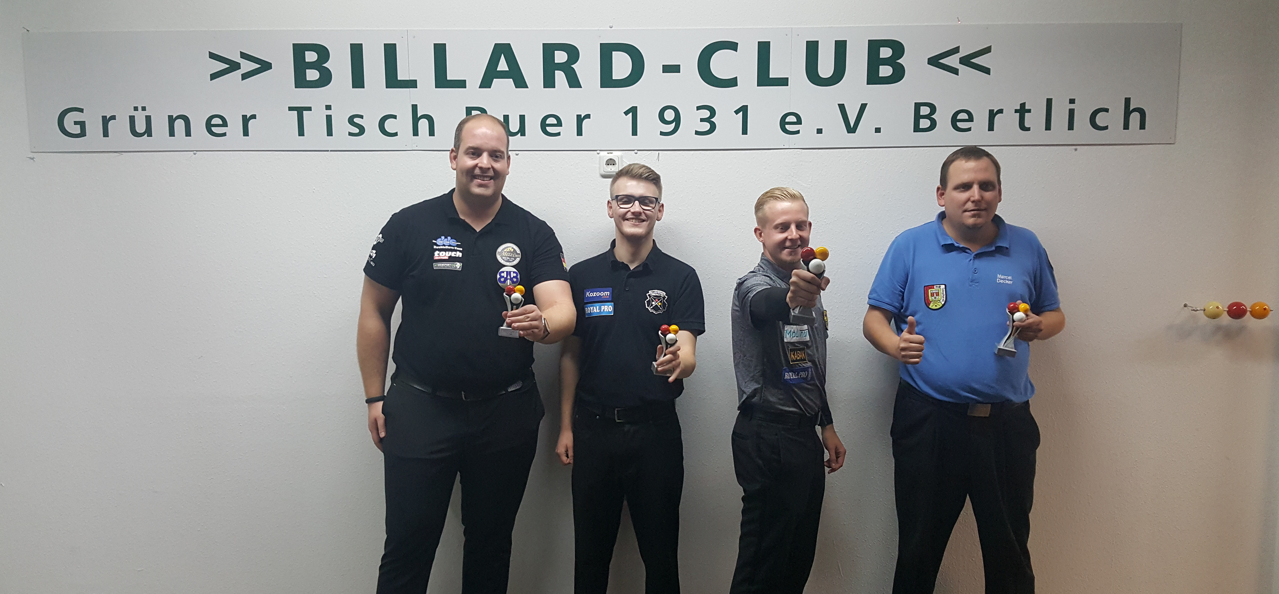 siehe Dateiname